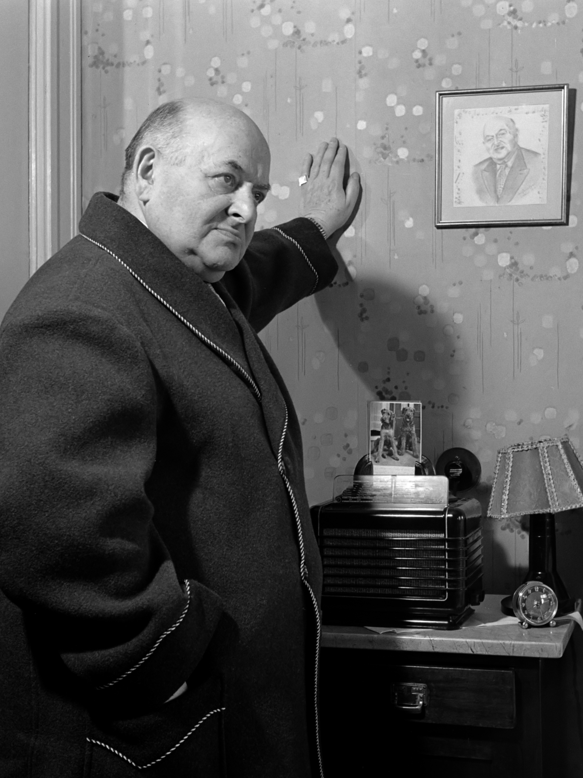 Rudolf Nelson viert 75ste verjaardag; Duitse cabaretier en componist Rudolf Nelson (April 4, 1878—Februari 5, 1960) naar muziek luisterend in zijn hotelkamer in Hotel Schiller in Amsterdam. Hotel Schiller bevindt zich aan het Rembrandtplein